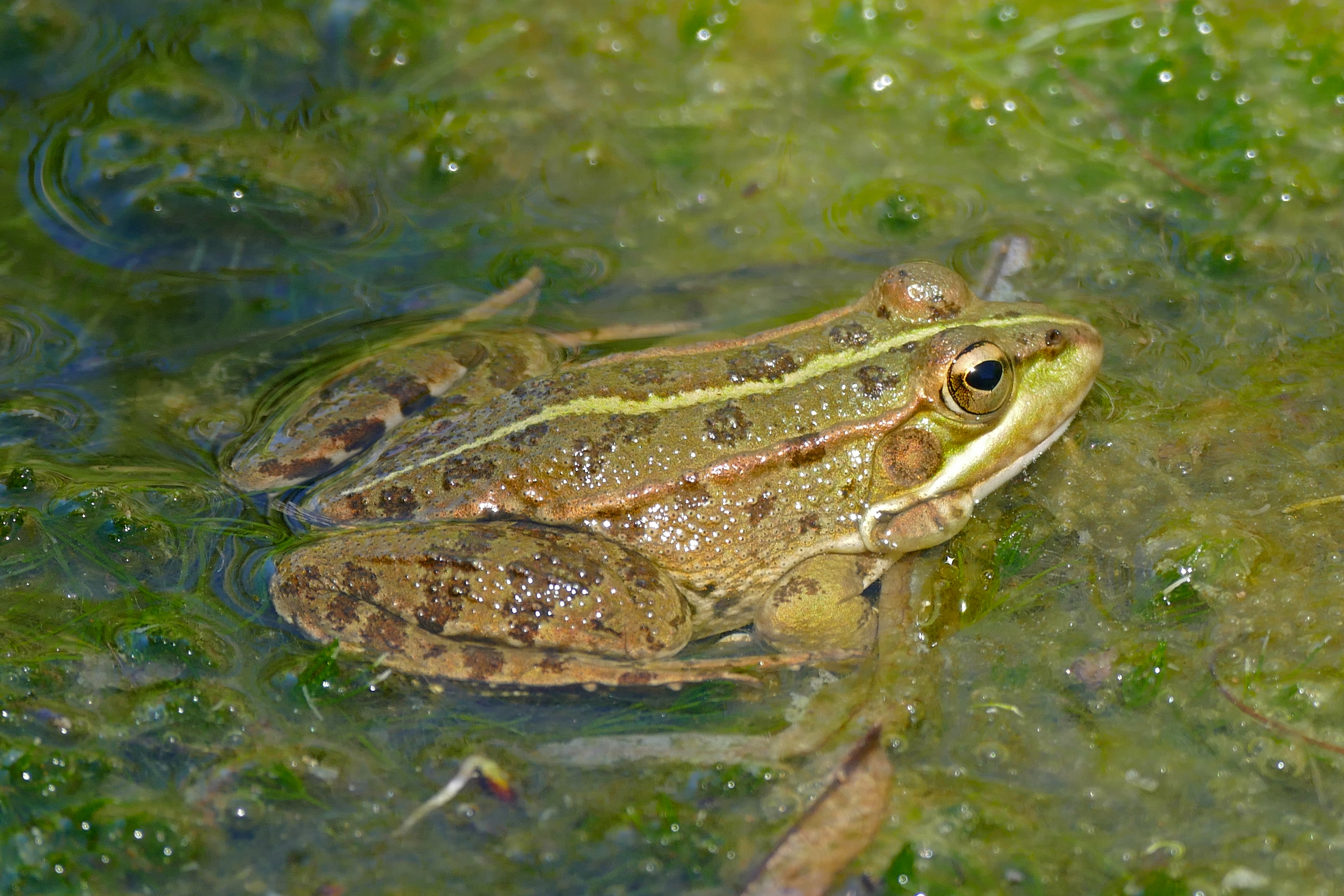 El Cortalet, Los Aiguamolls del' Empordà, Castelló d'Empúries, Catalunya, SPAIN